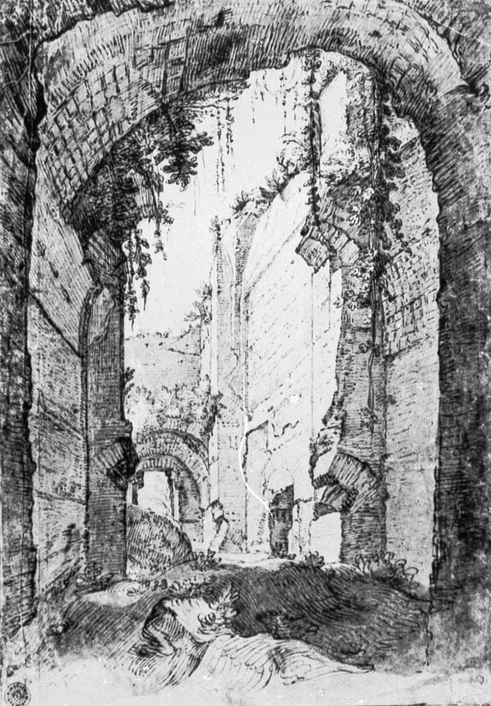 Italienische Ruinen (German title)